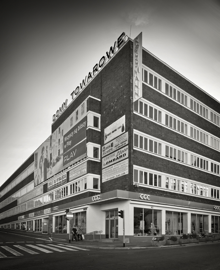 Kaufhaus Schocken in Waldenburg (heute Dom Handlowy Chełmiec w Wałbrzychu)